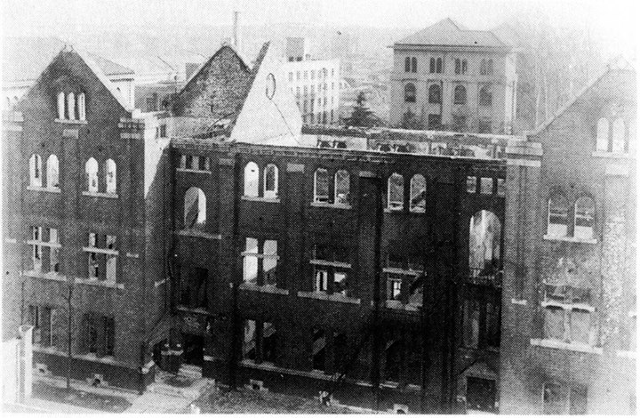 Université Waseda après le bombardement du 9 au 10 mars 1945